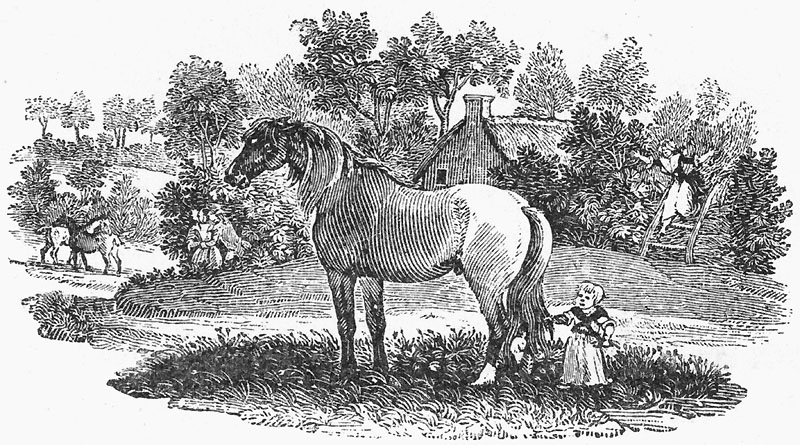 Illustration aus The General History of Quadrupeds (2nd edition). Autor: Thomas Bewick.